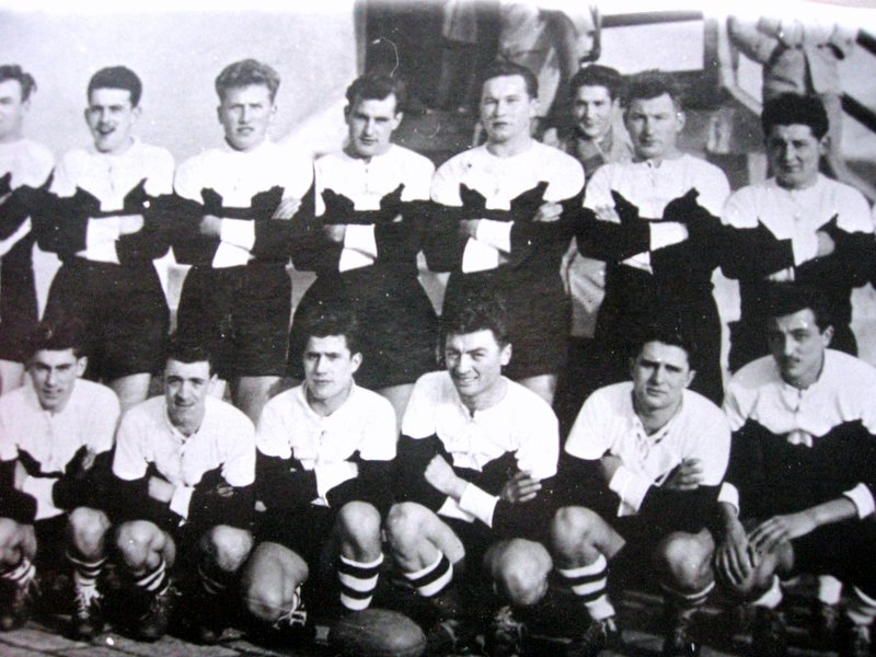 Equipe Rugby Fumel fin des années 1950